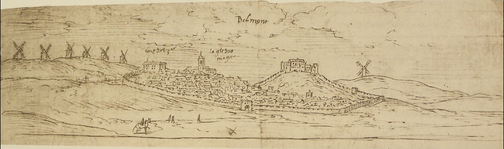 Dibujo a pluma de una vista general de Belmonte, realizado por Anthonis van den Wijngaerde en 1565. Mide 21,1 x 30,1 cm. Depositado en el Victoria and Albert Museum de Londres.